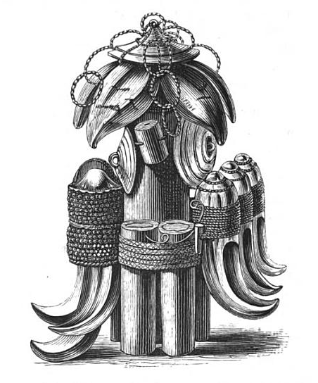 Illustraitie uit The Martyr Church: A Narrative of the Introduction, Progress, and Triumph of Christianity in Madagascar, with Notices of Personal Intercourse and Travel in the Island (J. Snow, 1870) door William Ellis